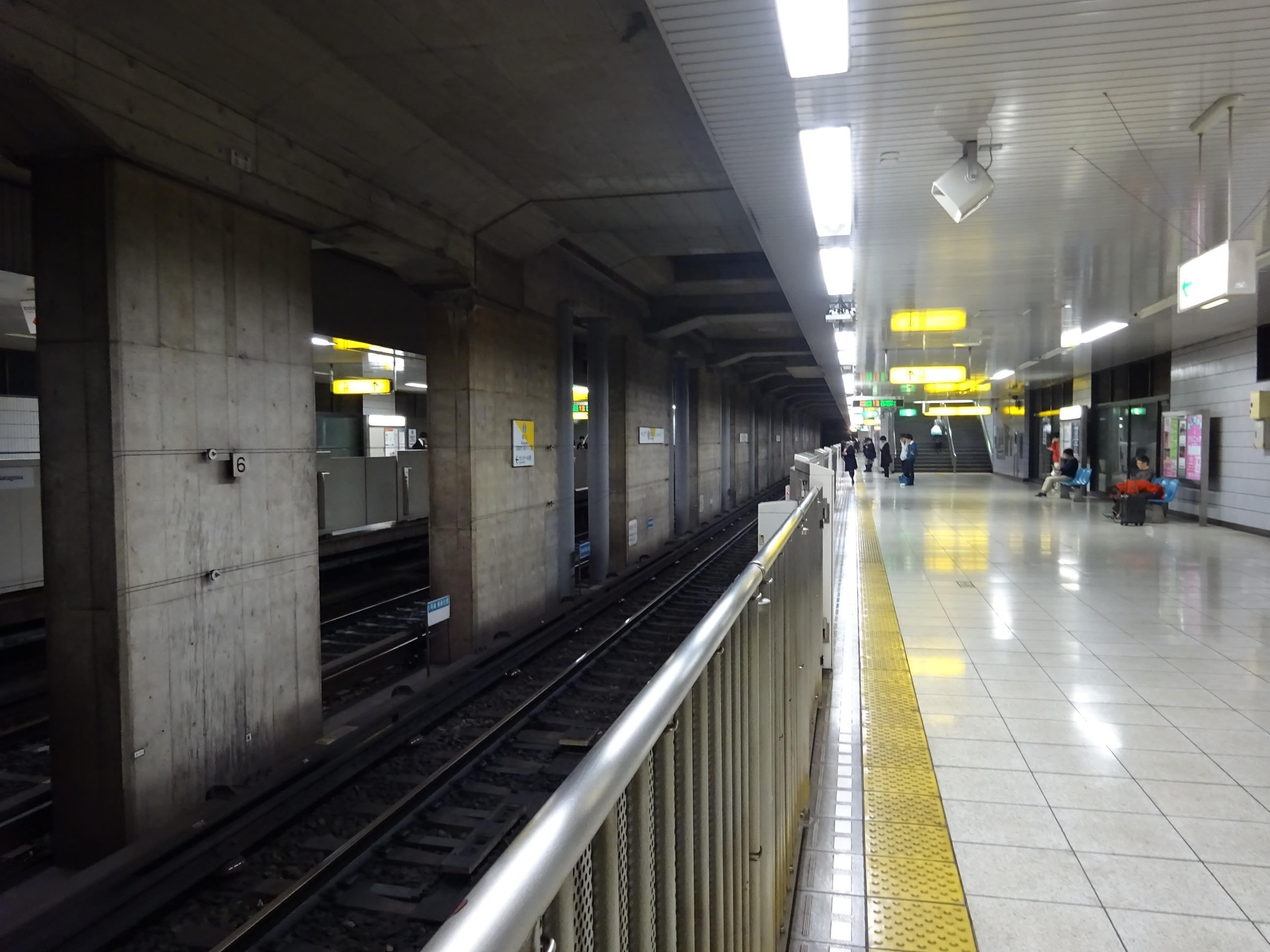 中川駅ホーム